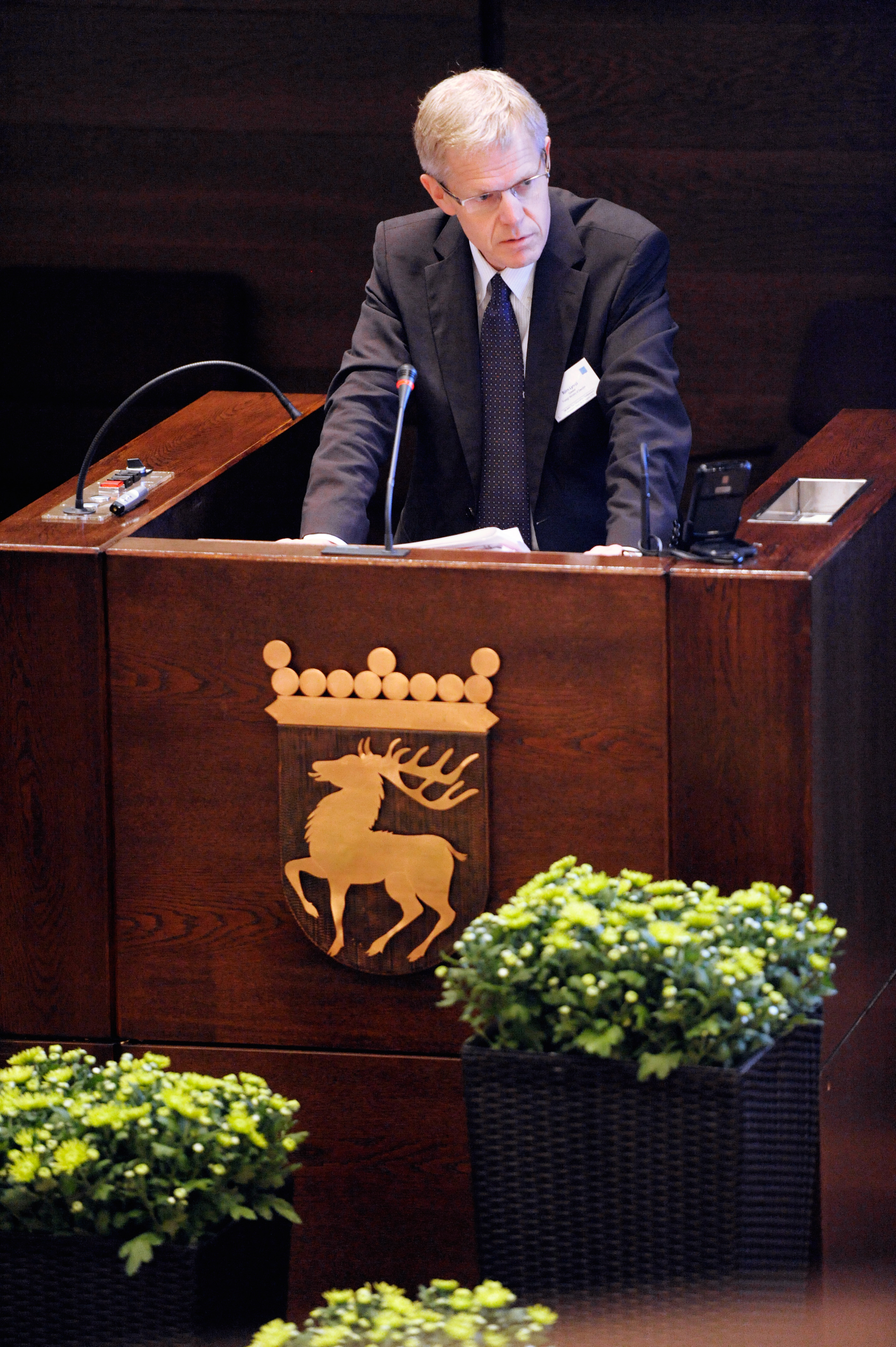 Björn Lyrvall Utrikesråd för politiska frågor Sverige. BSPC 19 Mariehamn Åland 2010.